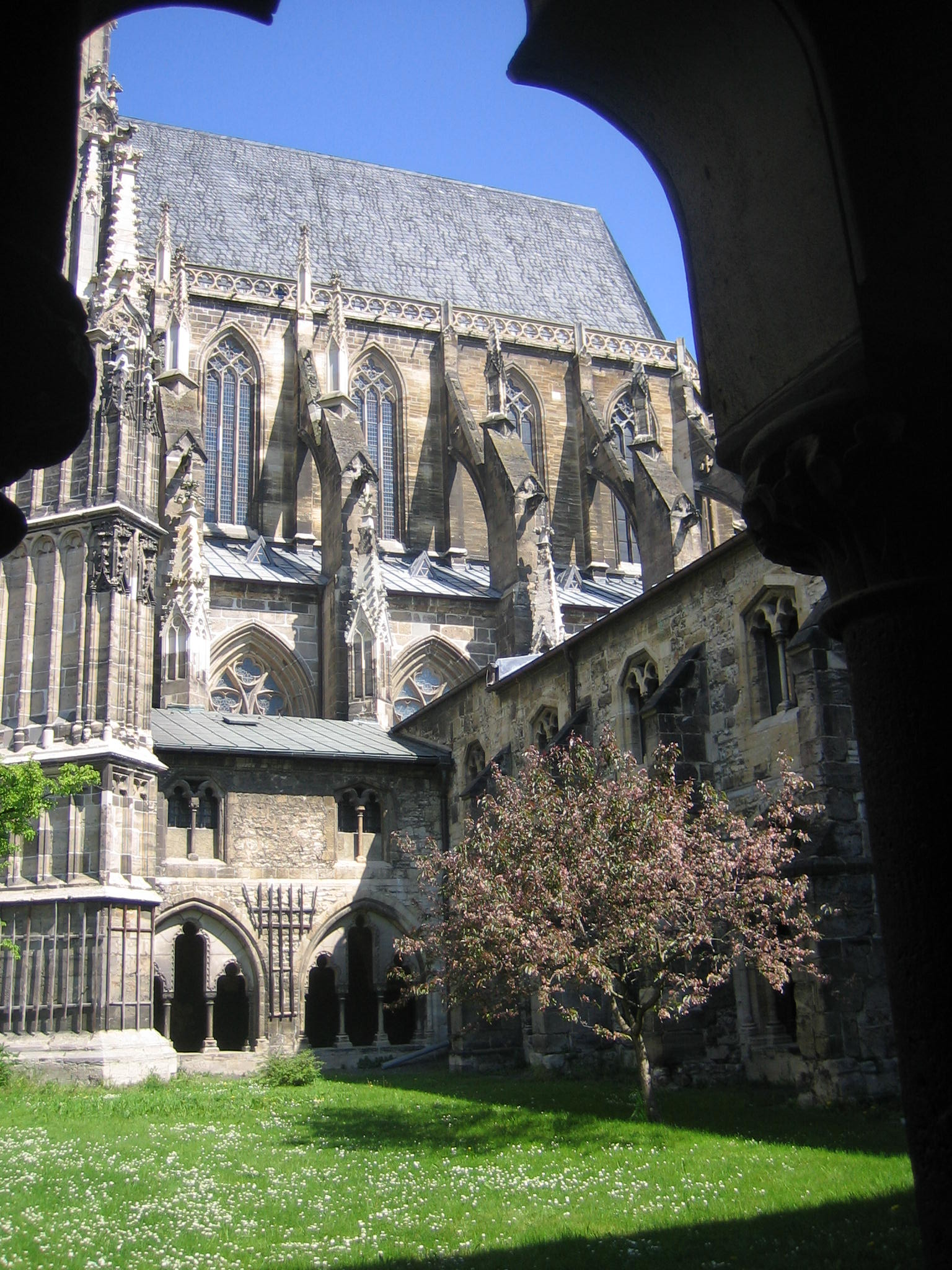 Blick aus dem Kreuzgang in Halberstadt